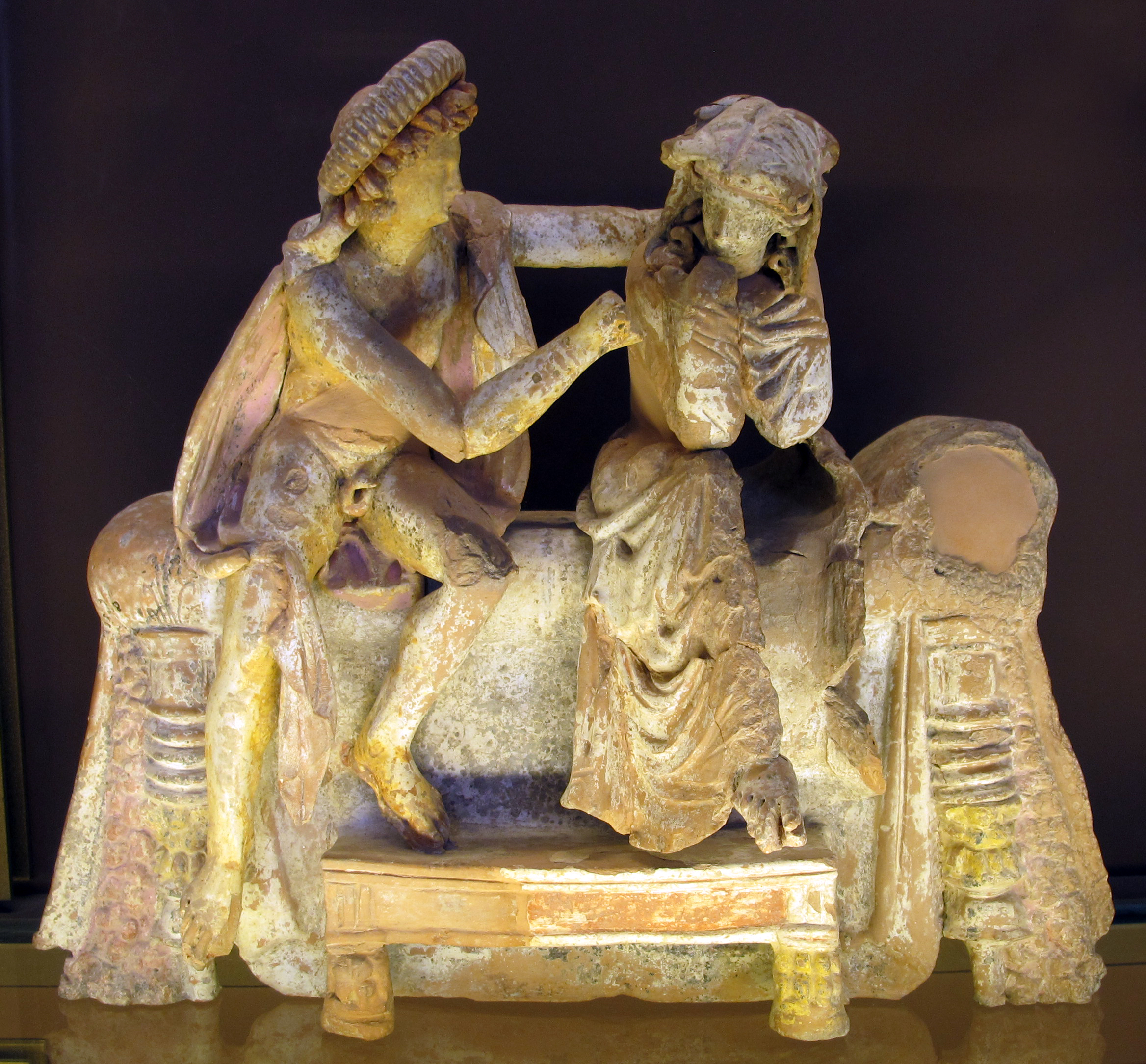 Myrina, atelier di nicostratos, statuetta di coppia abbracciata sul talamo, 150-100 ac. ca.